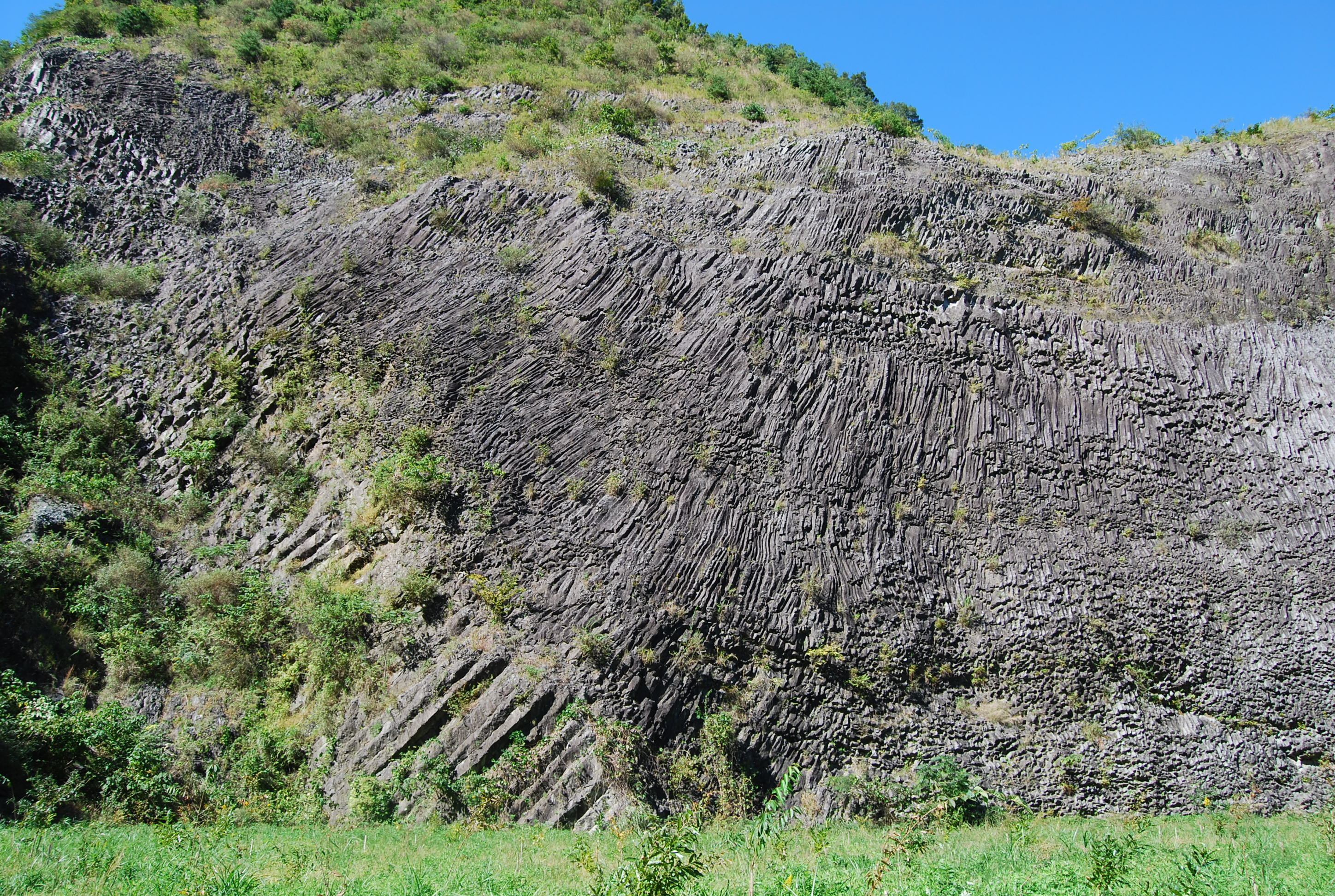 山容を形成する岩盤の玄武岩柱状節理群。その大きさは国内最大規模と言われている。